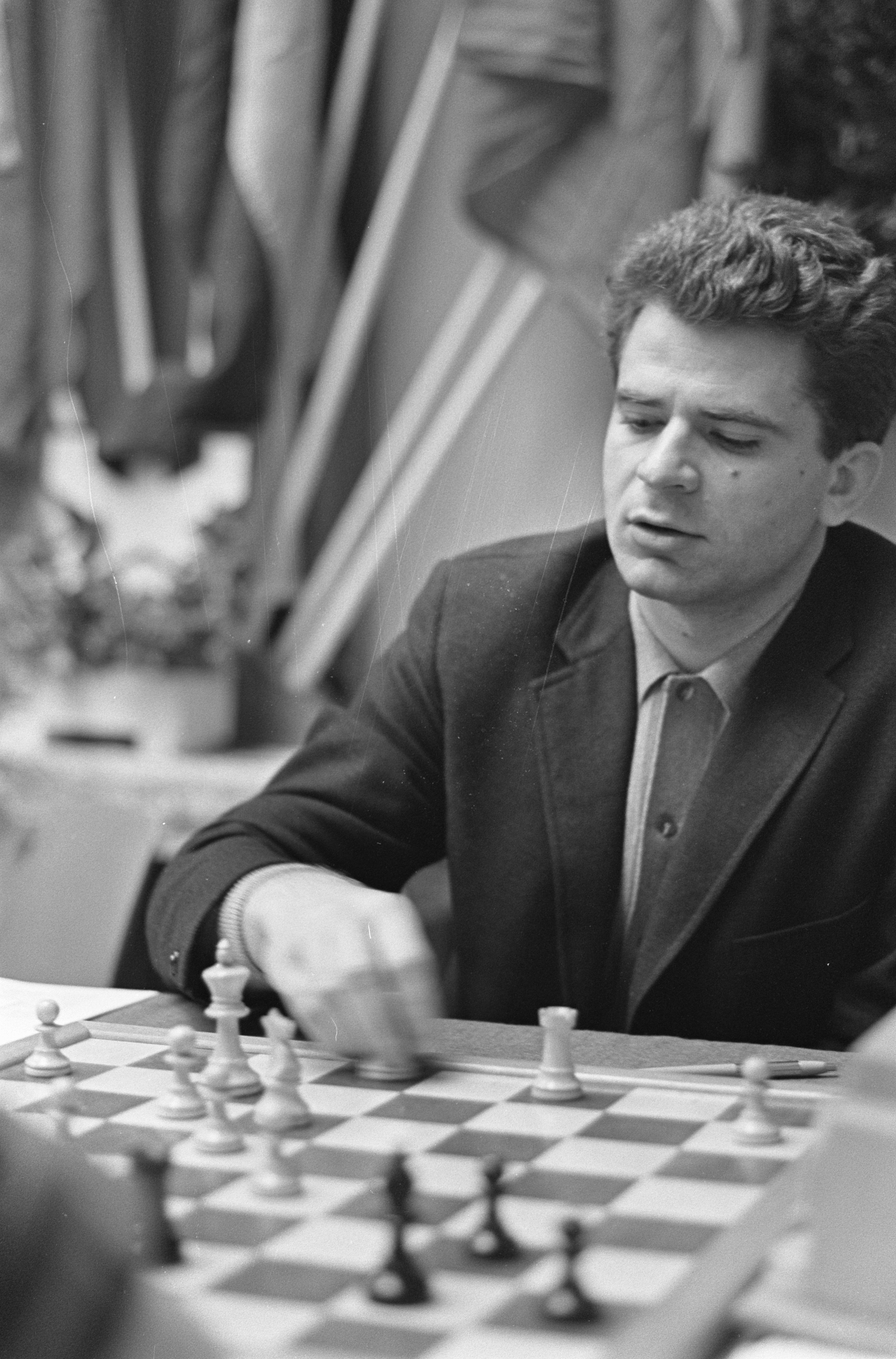 Collectie / Archief : Fotocollectie Anefo Reportage / Serie : [ onbekend ] Beschrijving : Hoogovenschaaktoernooi Datum : 28 januari 1967 Trefwoorden : schaken Instellingsnaam : Hoogovenschaaktoernooi Fotograaf : Nijs, Jac. de / Anefo Auteursrechthebbende : Nationaal Archief Materiaalsoort : Negatief (zwart/wit) Nummer archiefinventaris : bekijk toegang 2.24.01.05 Bestanddeelnummer : 920-0219